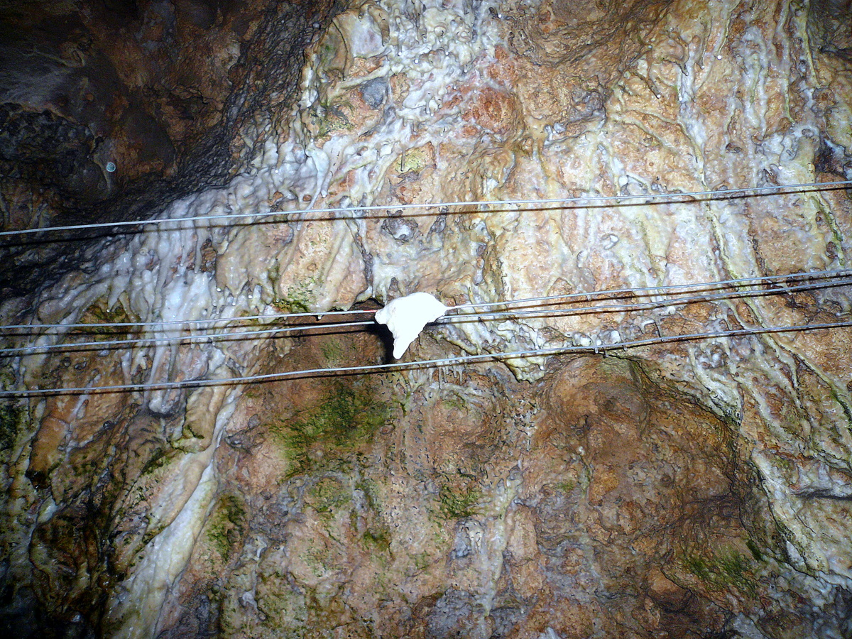 Charlottenhöhle